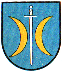 Herb wsi Chronów, gmina Nowy Wiśnicz.